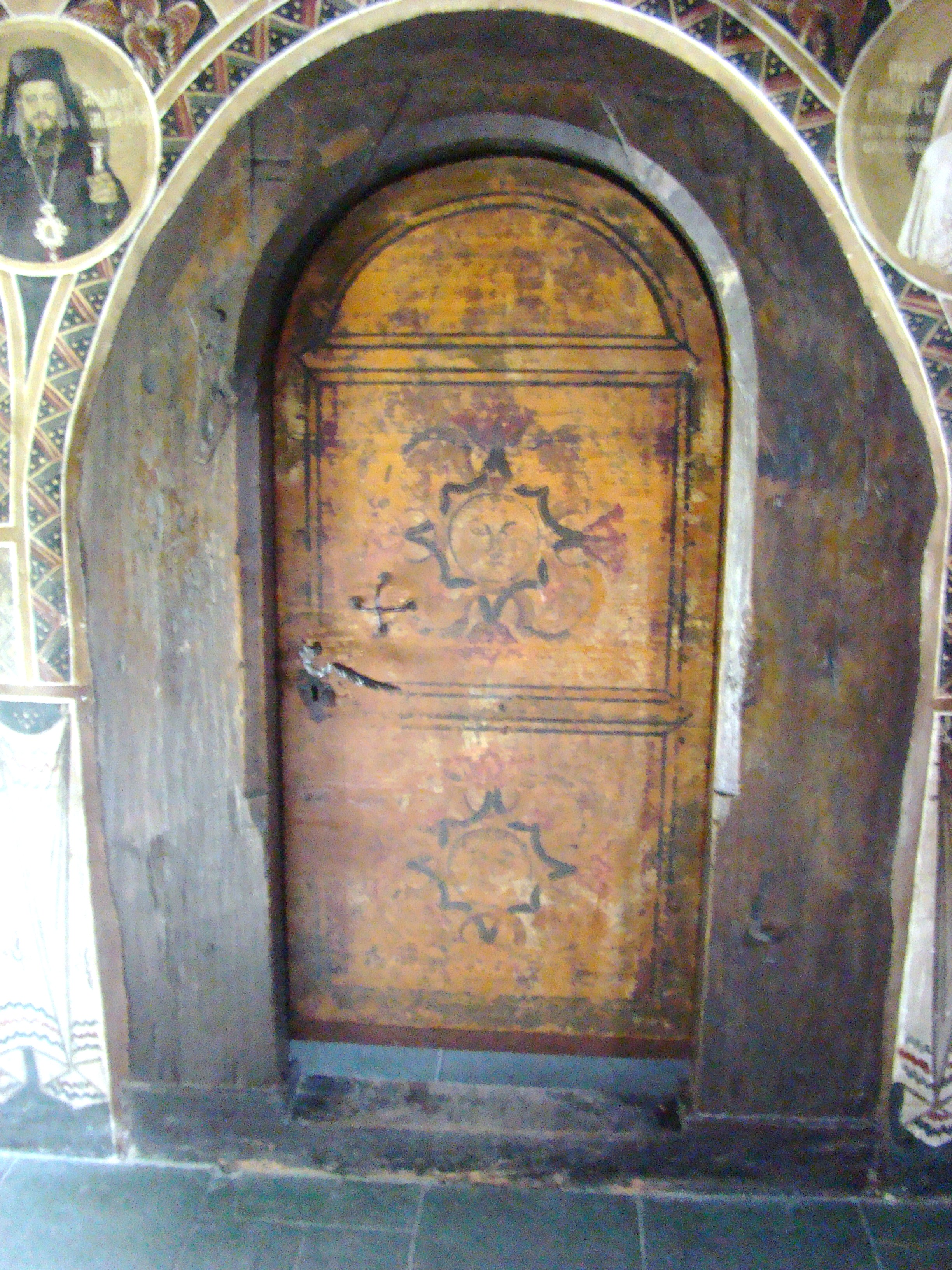 Biserica de lemn "Sf. Nicolae" a mănăstirii Lupşa, sat VALEA LUPŞII; comuna LUPŞA